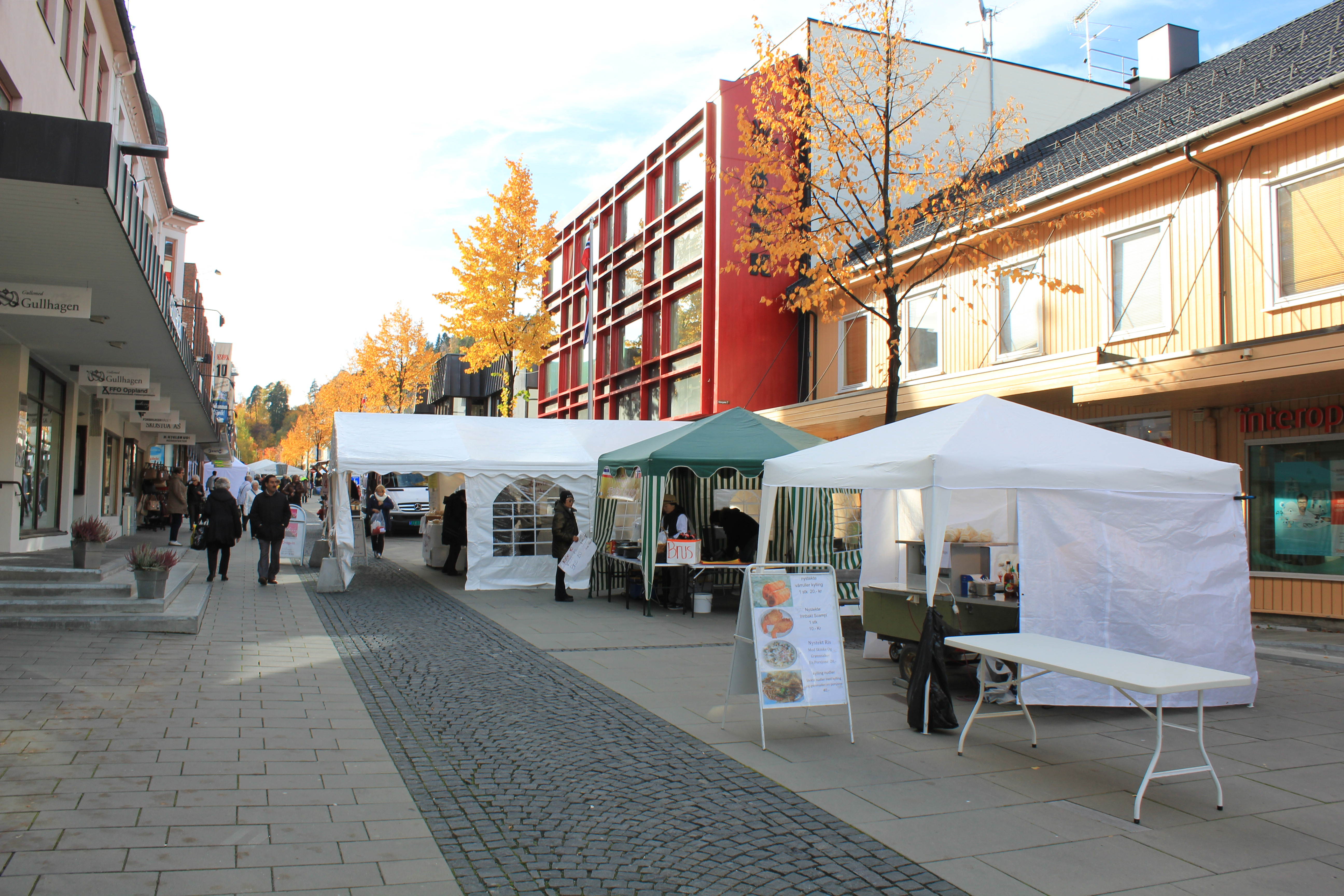 Gågata i Gjøvik.